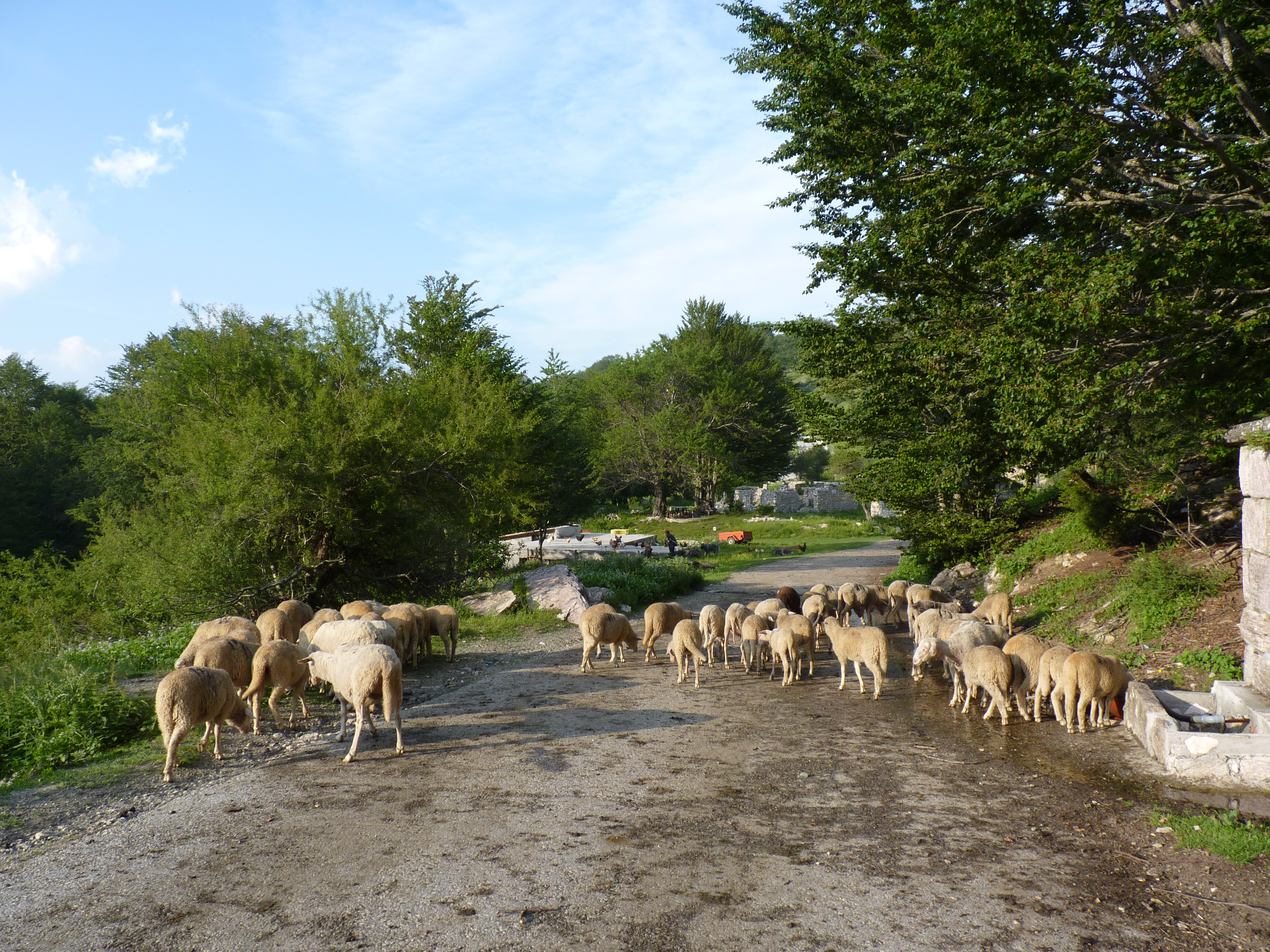 Mavrovo National Park